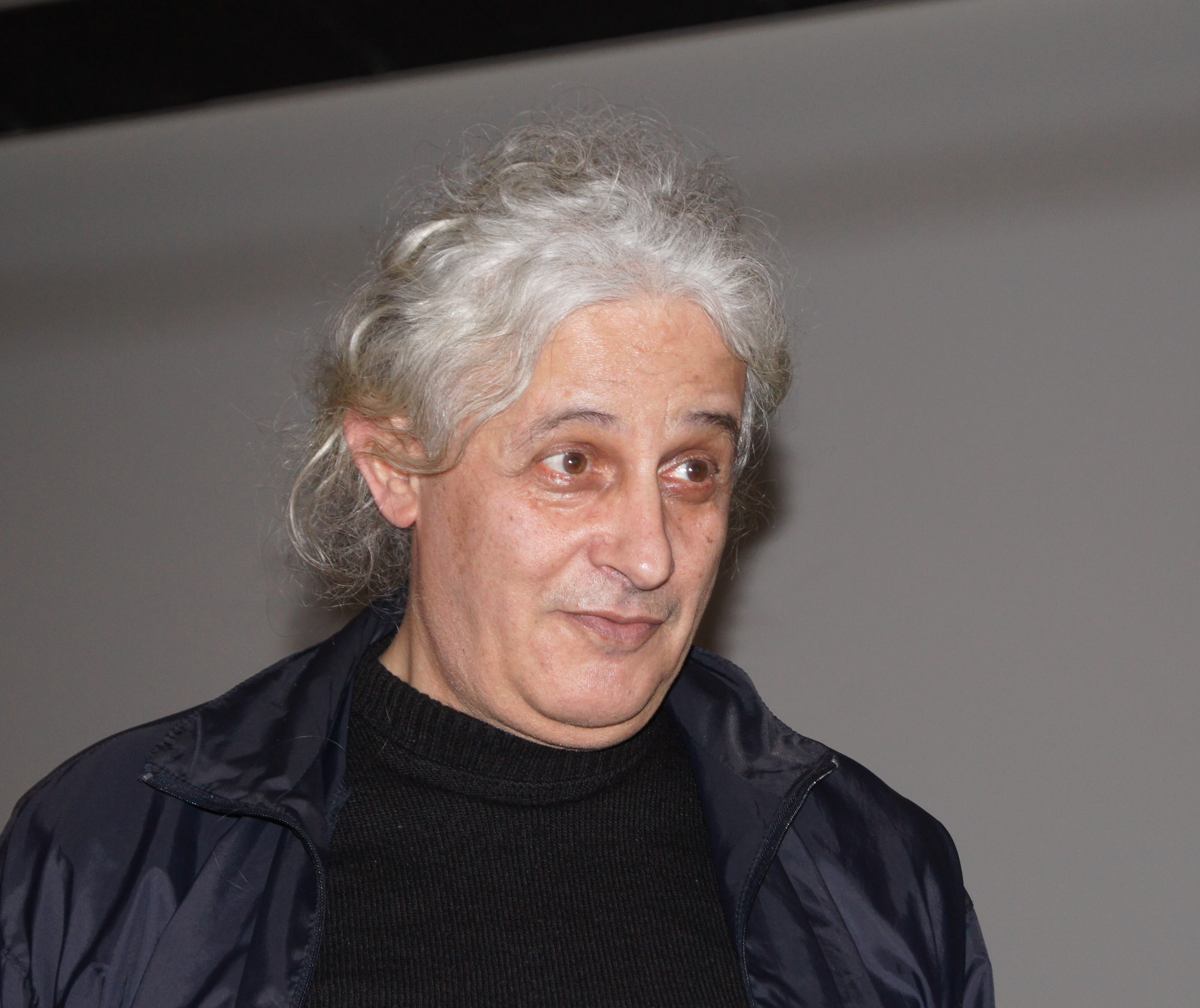 Le réalisateur grec Dimos Avdeliodis en février 2020.